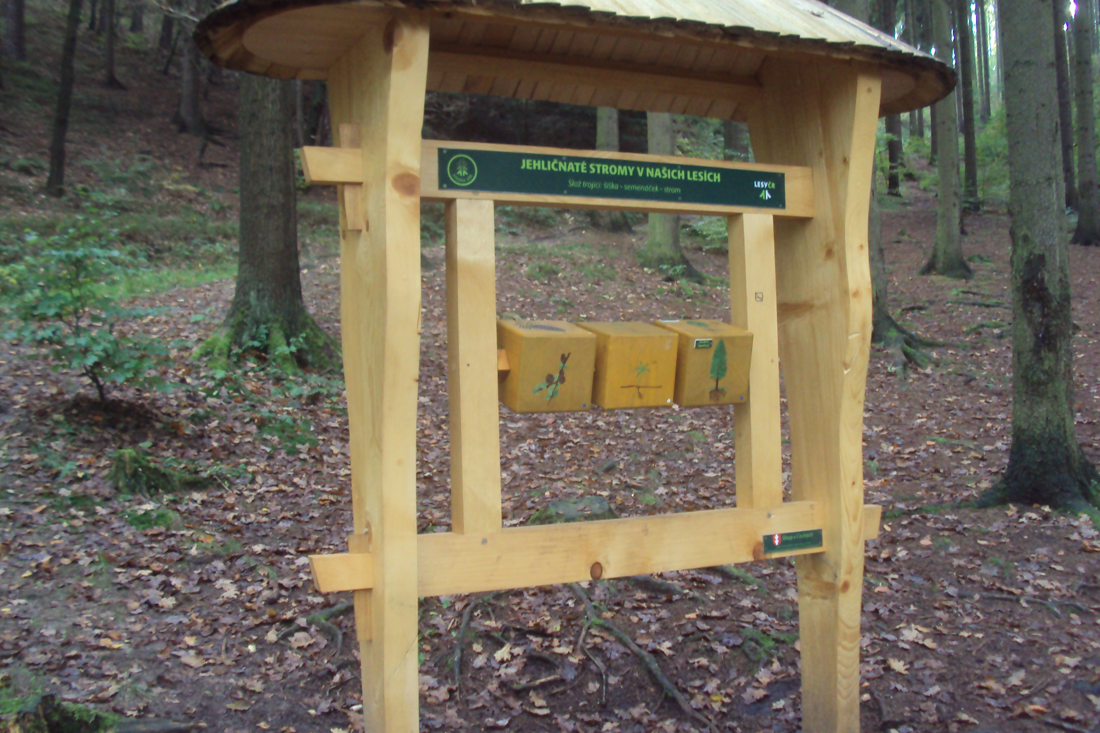 Zastavení naučné stezky